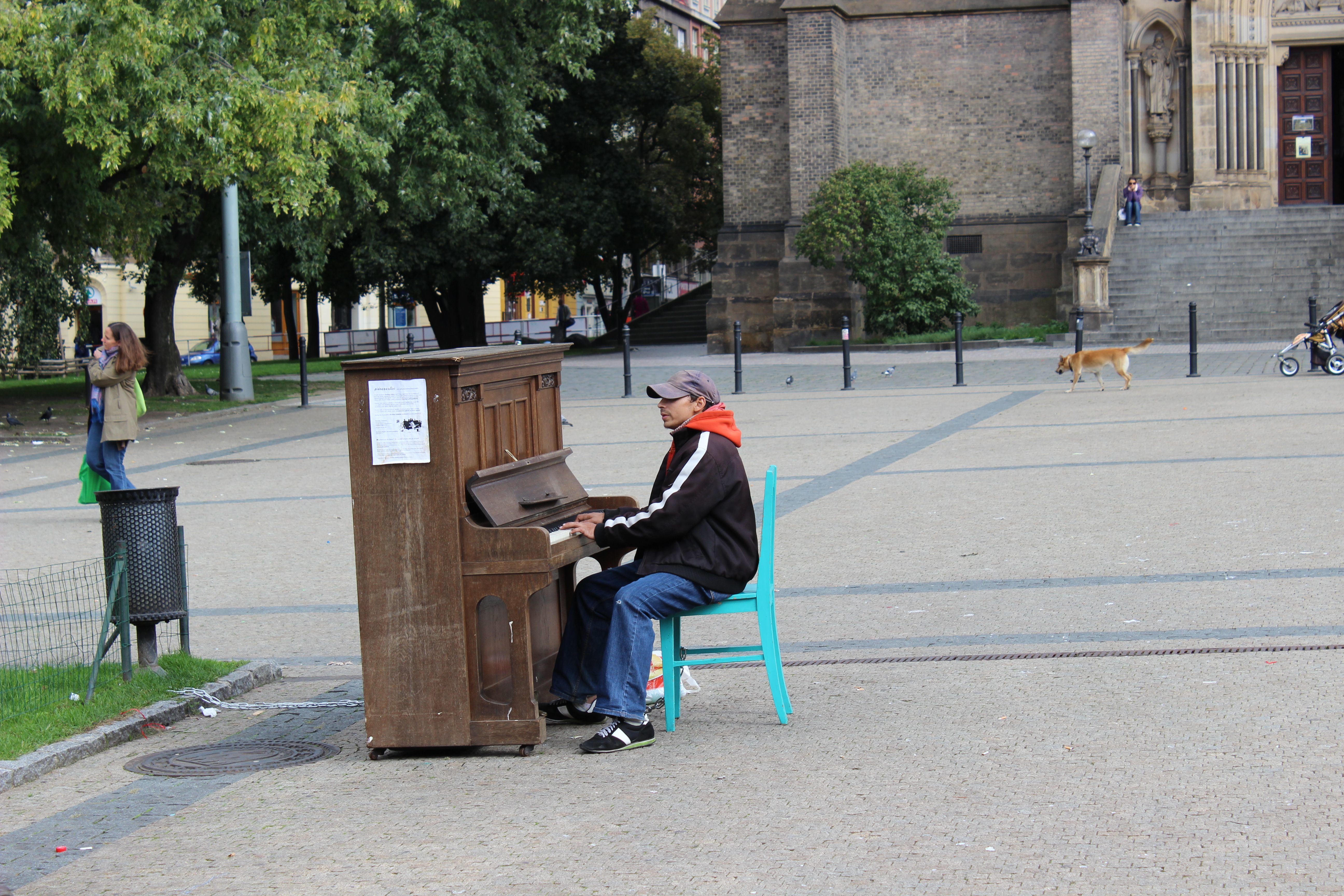 Pianista na pražském náměstí Míru.